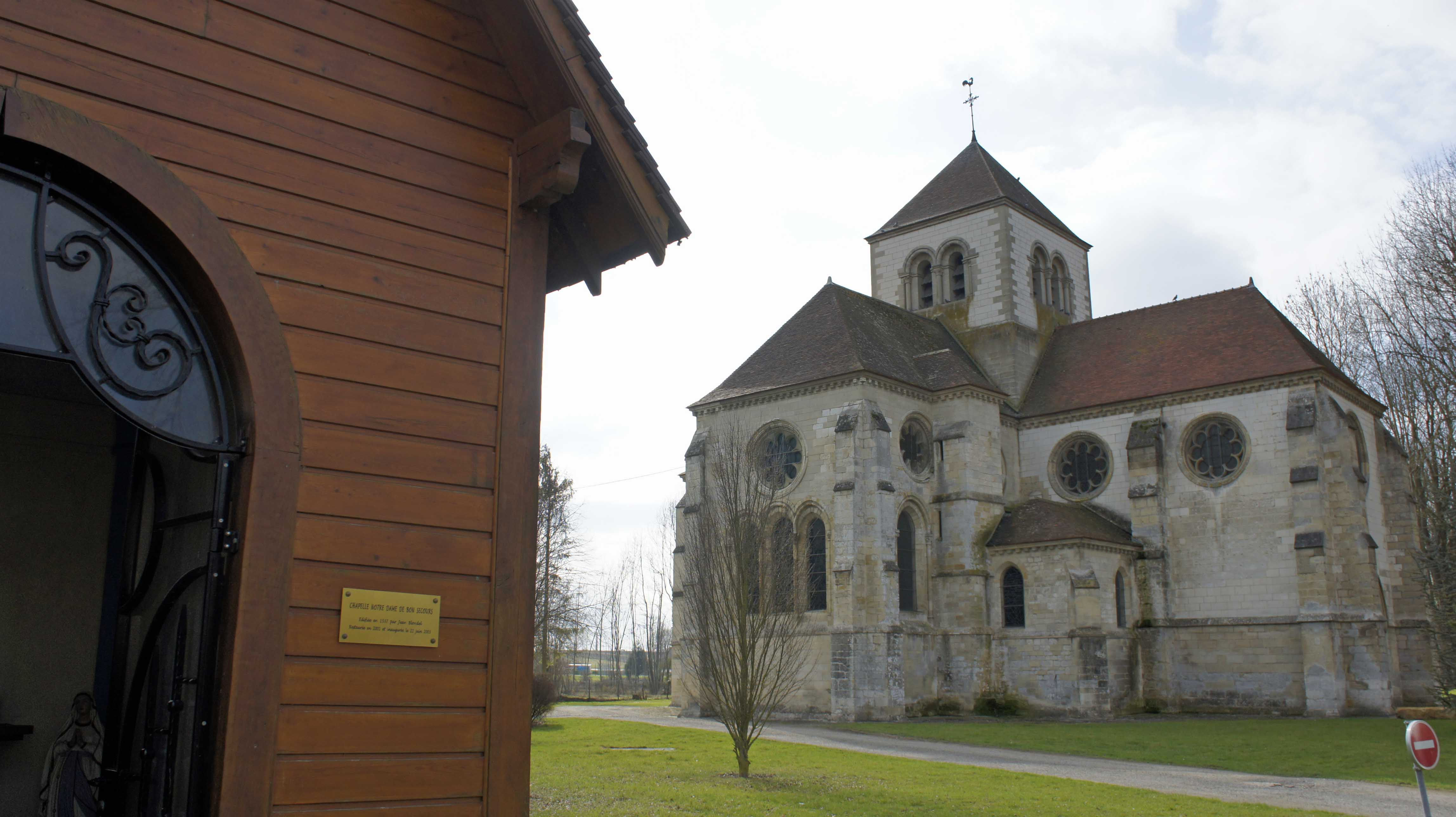 au premier plan, la Chapelle Notre Dame du Bonsecours et au second plan l'église du XIIe et XIIIe siècle, Boult sur Suippe.